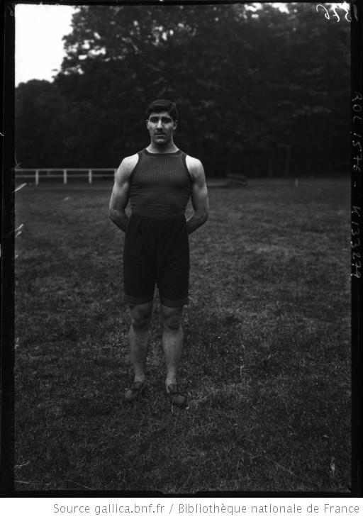 Raoul Paoli en 1908, il a été boxeur, catcheur, lanceur de poids de disque, de lutte greco-romaine et à mainte reprise champion de France.